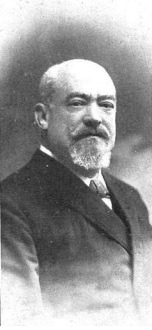 Rafael Salilla. Obra del fotógrafo Kaulak.